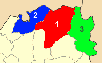 Χάρτης των ενοτήτων (και πρώην δήμων) από τις οποίες αποτελείται ο Δήμος Παλαμά